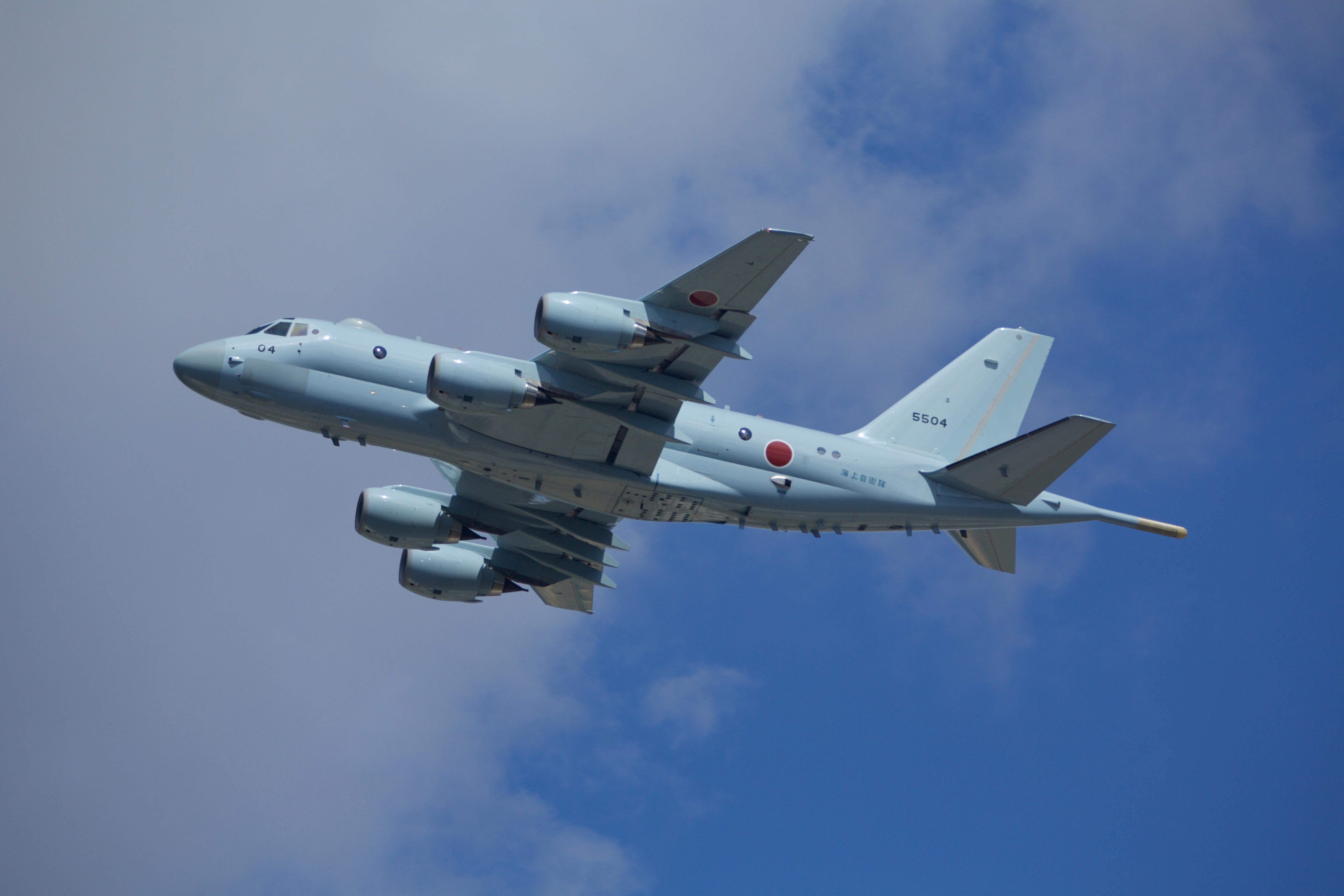 Kawasaki P-1